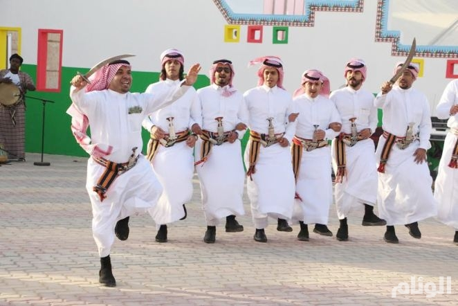 فرقة تؤدي لون الدمة العسيرية